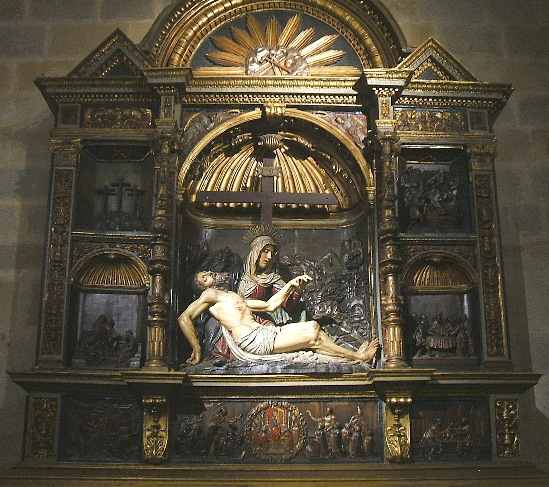 Retablo de la Piedad, Iglesia de San Antón, Bilbao